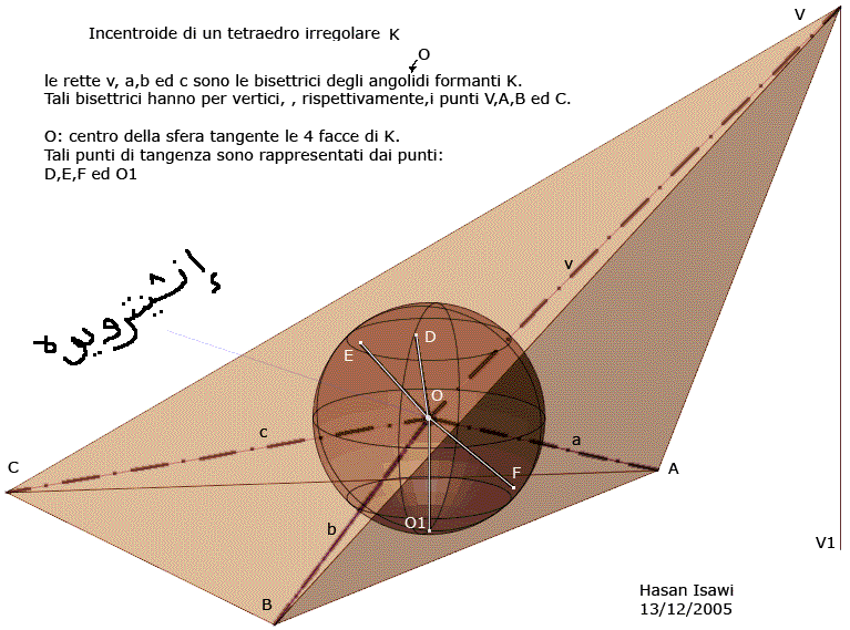 L'immagine visualizza l'incentroide di un poliedrotetraedrico. Questa immagine proviene dal sito personale di Hasan ISAWI (docente di geometria descrittiva all'Università "la sapienza" di Roma).